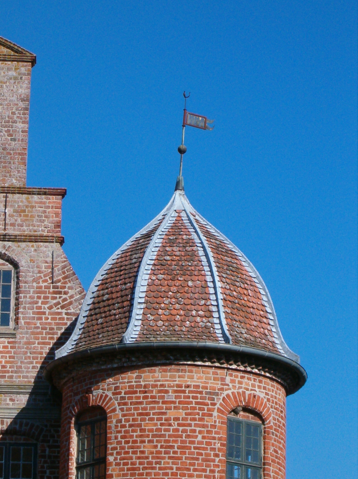 Vindfløj på hjørnetårn på Rosenholm Slot / Spire on Rosenholm Castle, Jutland, Denmark